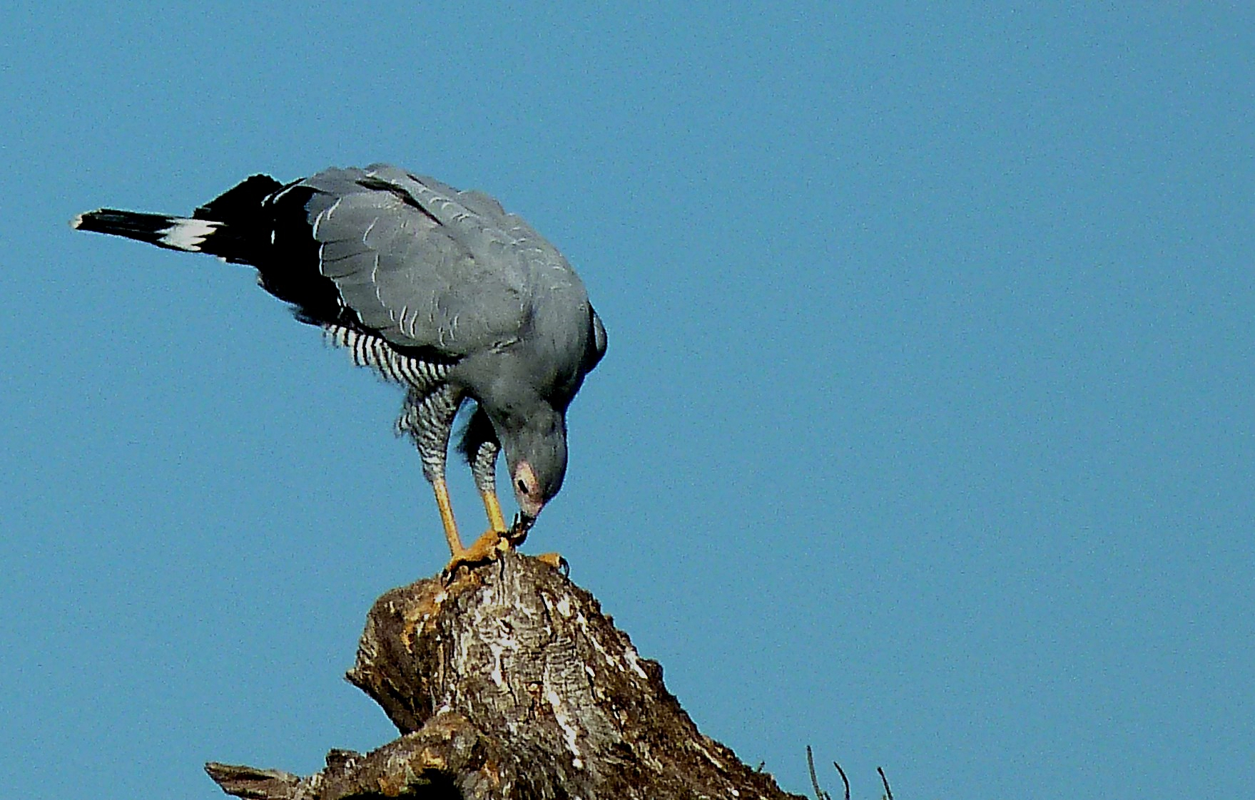 Gymnogène de Madagascar